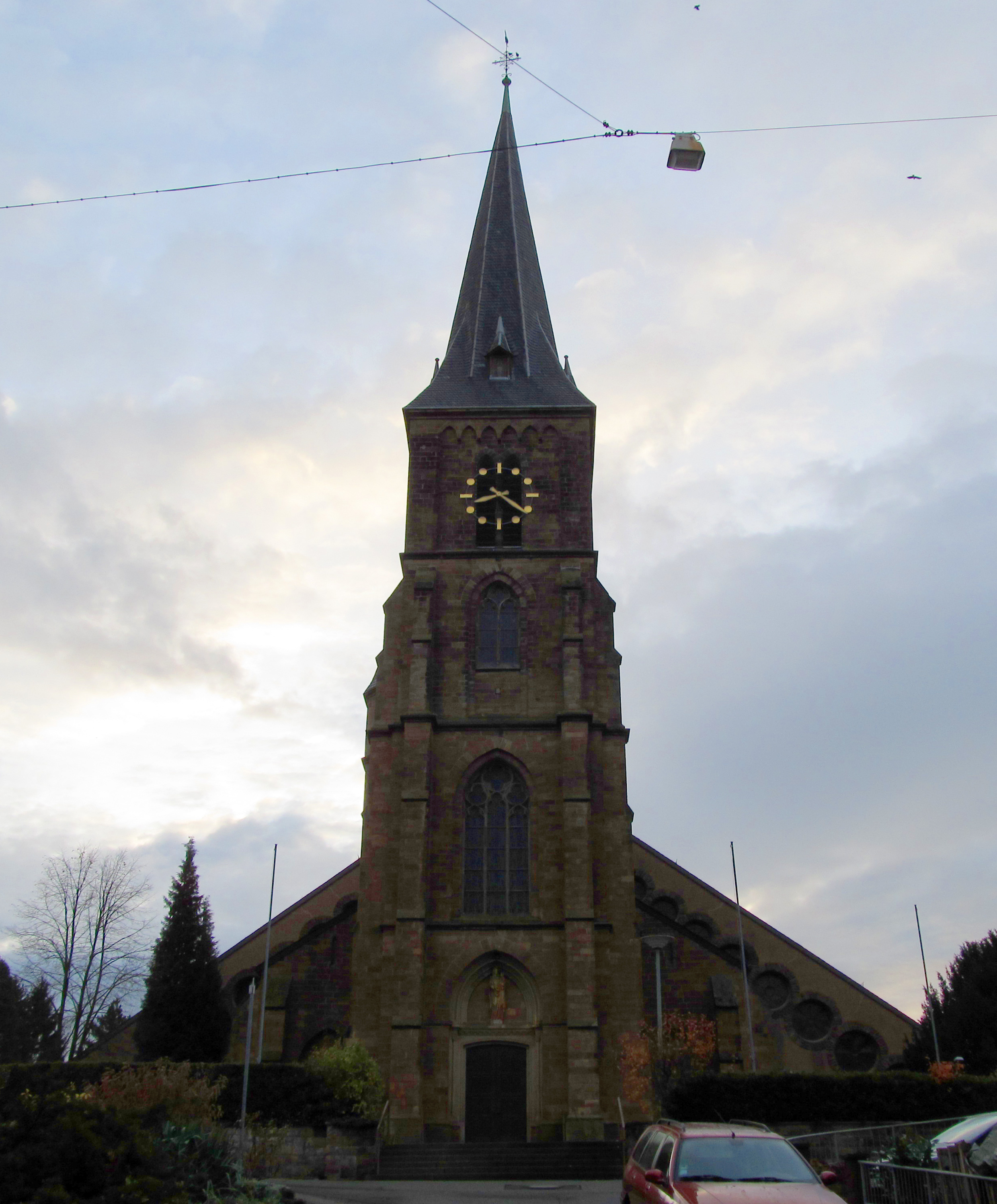 Die katholische Liebfrauenkirche in Püttlingen, Saarland